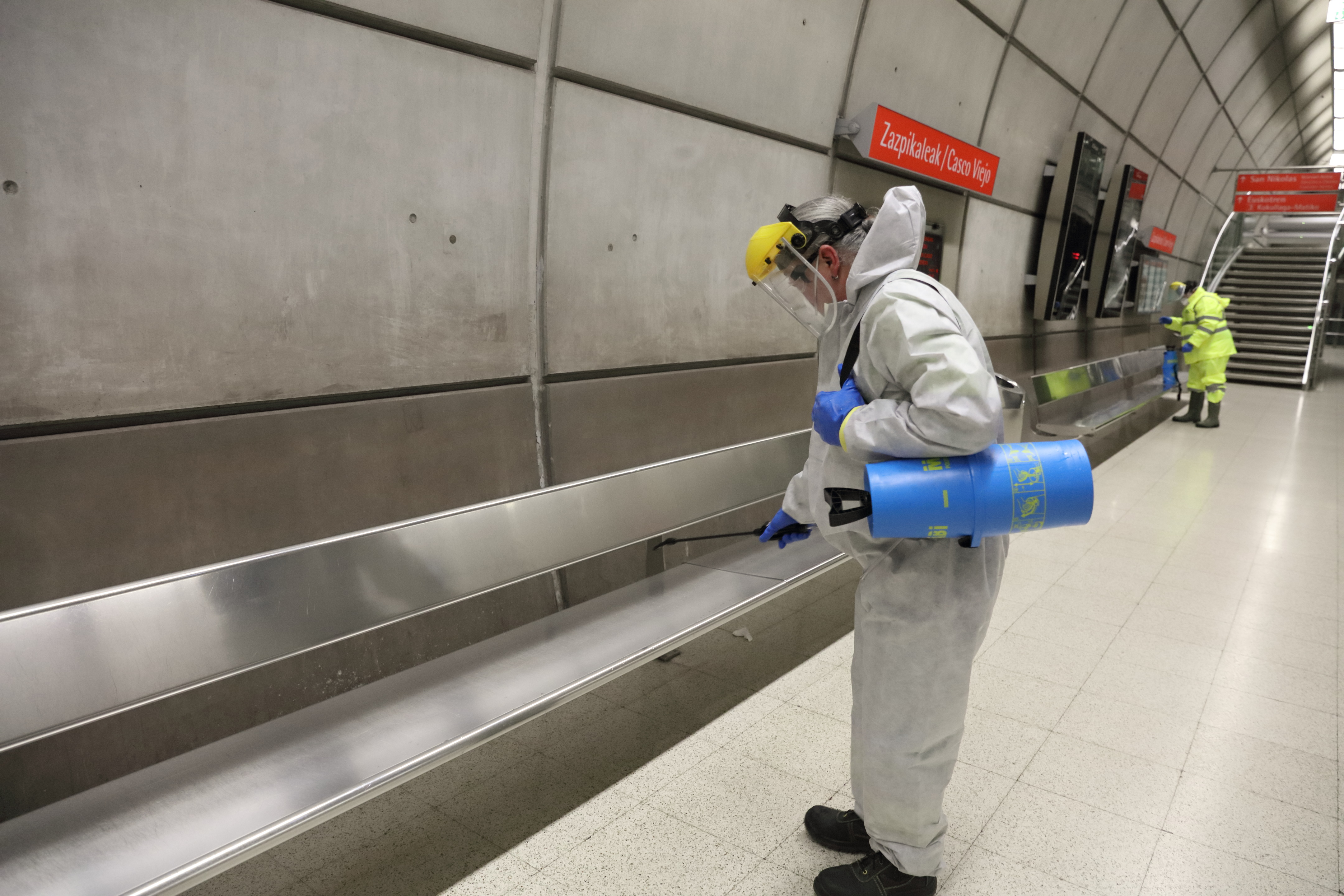 Euskadik desinfekzio-lanak indartu ditu bere trenbide-sareko geltokietan